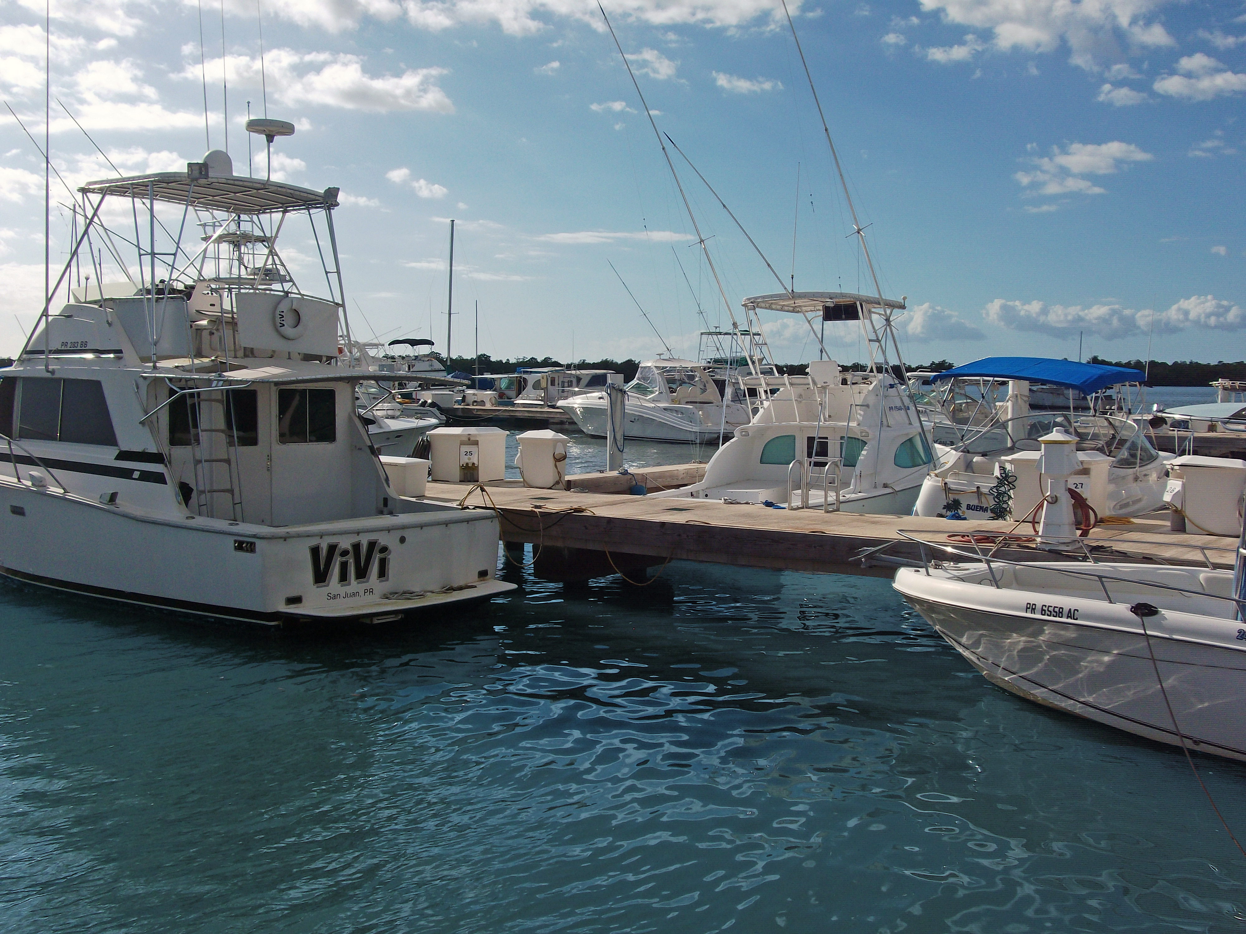 Puerto Real, Zona Oeste.